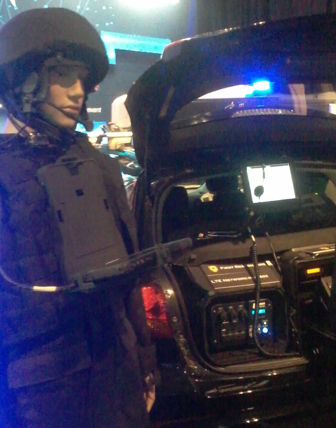 HLS בשנת 2018 כנס